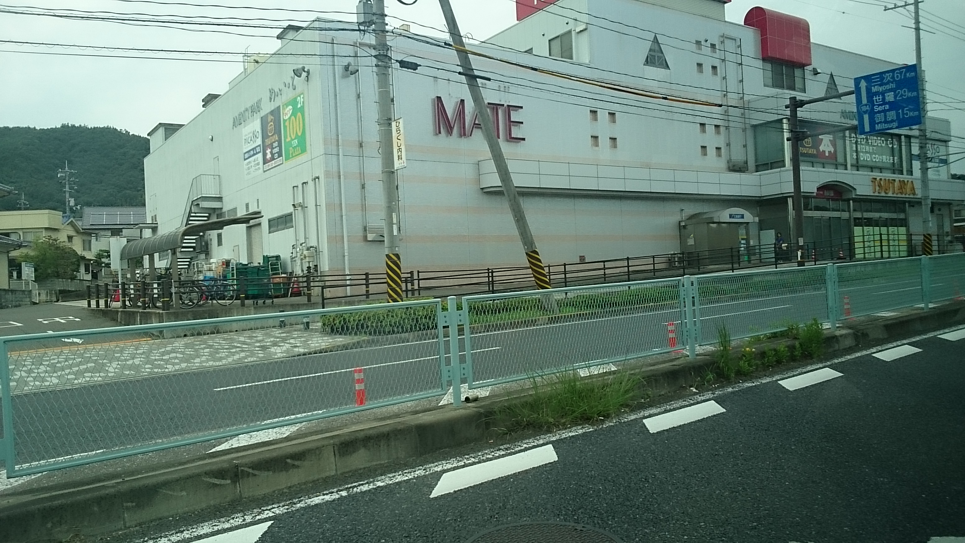 メイト栗原店の写真です。